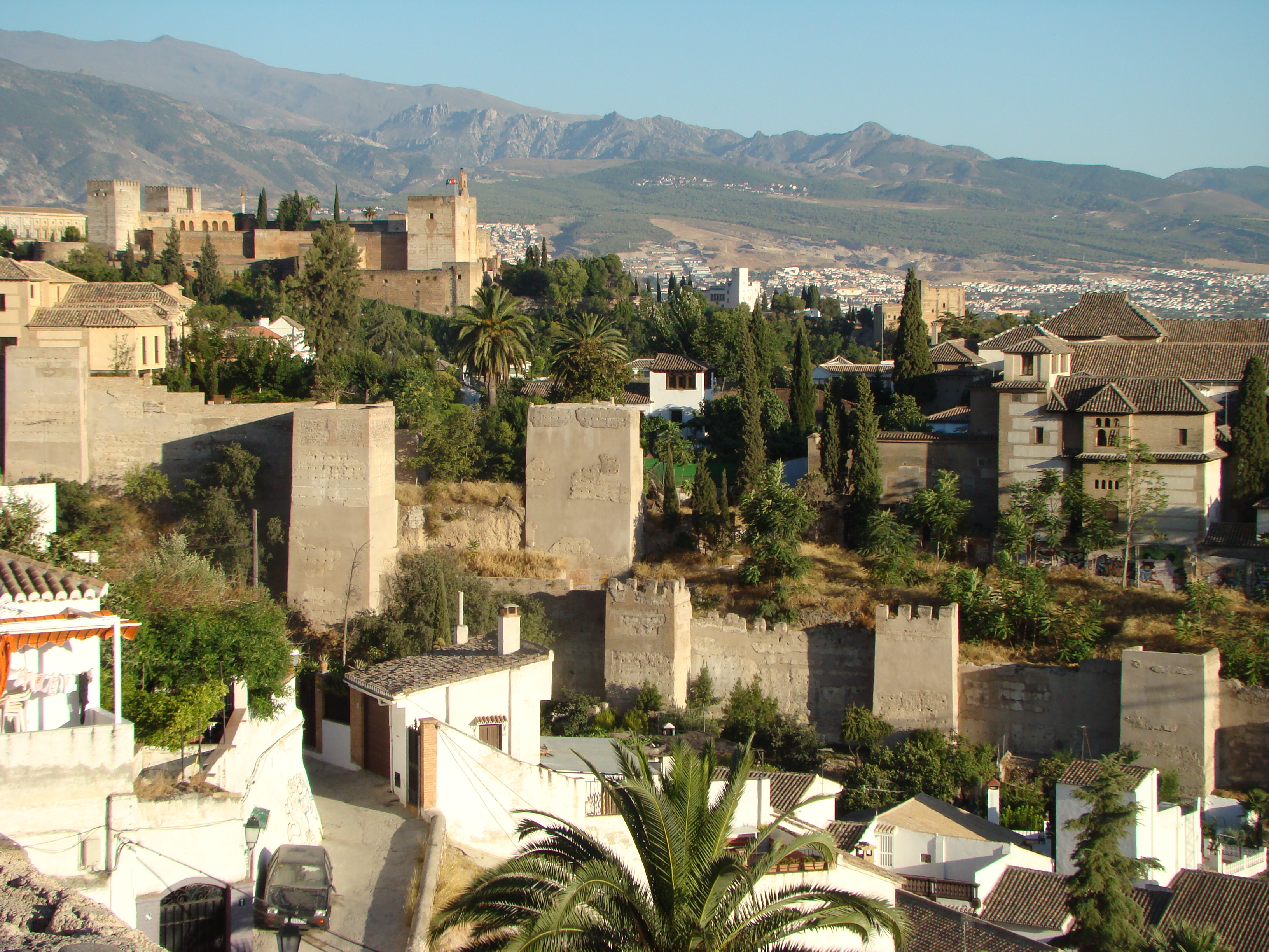 Vista de las murallas ziríes de la alcazaba Cadima (Granada)